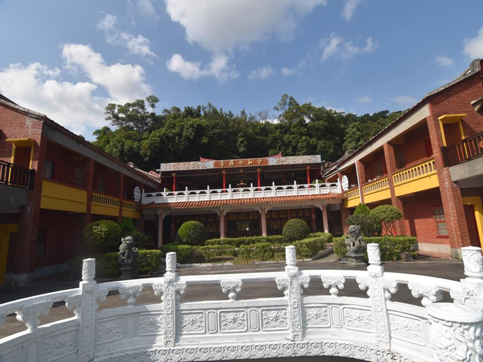 中文（台灣）: 章嘉活佛在藏傳佛教史具有崇高地位，且為佛教界重要之領導人物，是西藏黃教格魯派之活佛中，自1949年後唯一來臺定居者，對於推動藏傳佛教在臺發展與安定當時人心有顯著貢獻。造型具藏式舍利塔之重要特徵，包括塔剎、瓶形塔身及基座等三段式造型，極富特色與稀有性，具歷史建築保存價值。 1290391,121.5032476 中和禪寺後方山坡